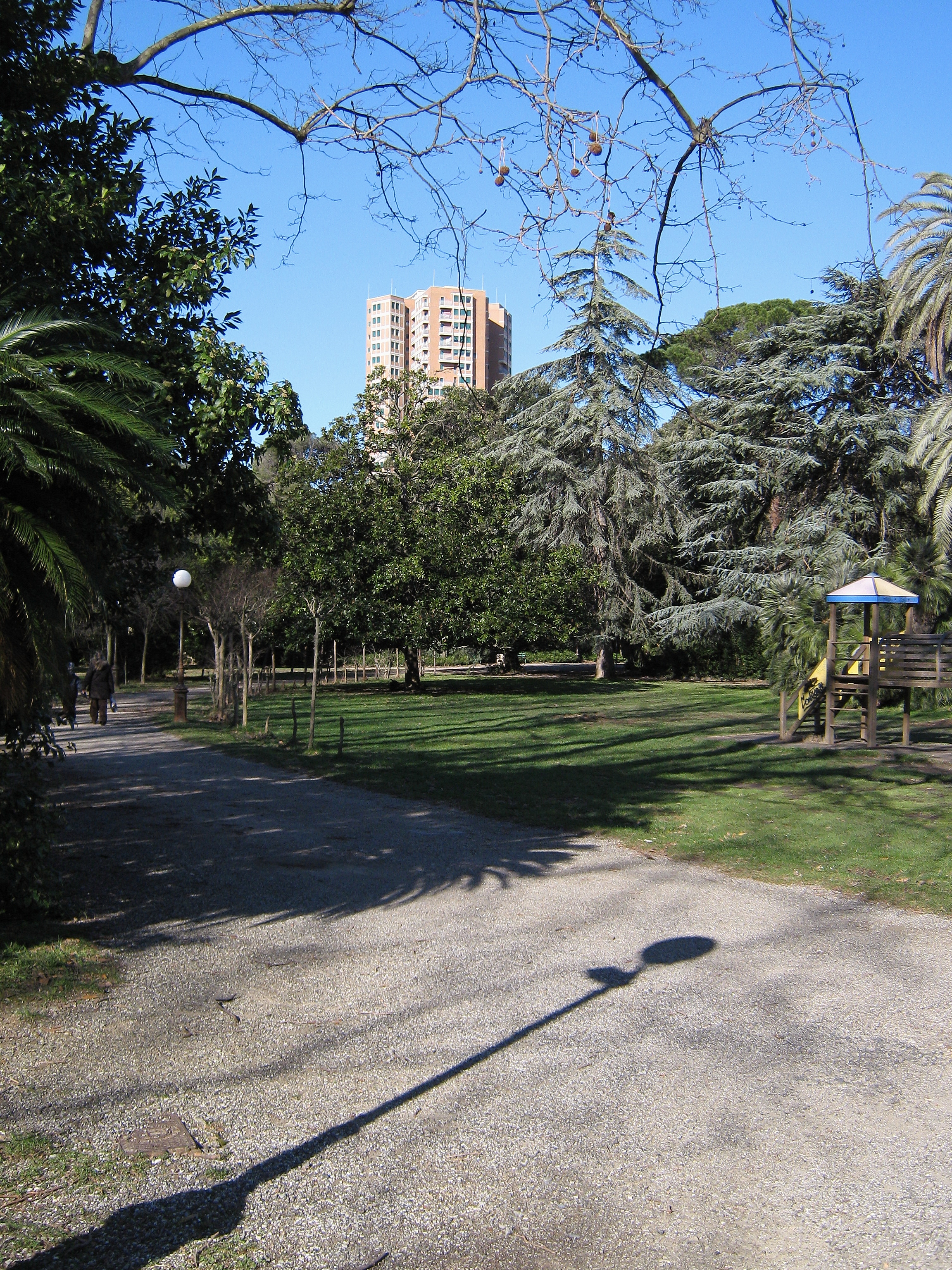 Livorno, parco di Villa Fabbricotti